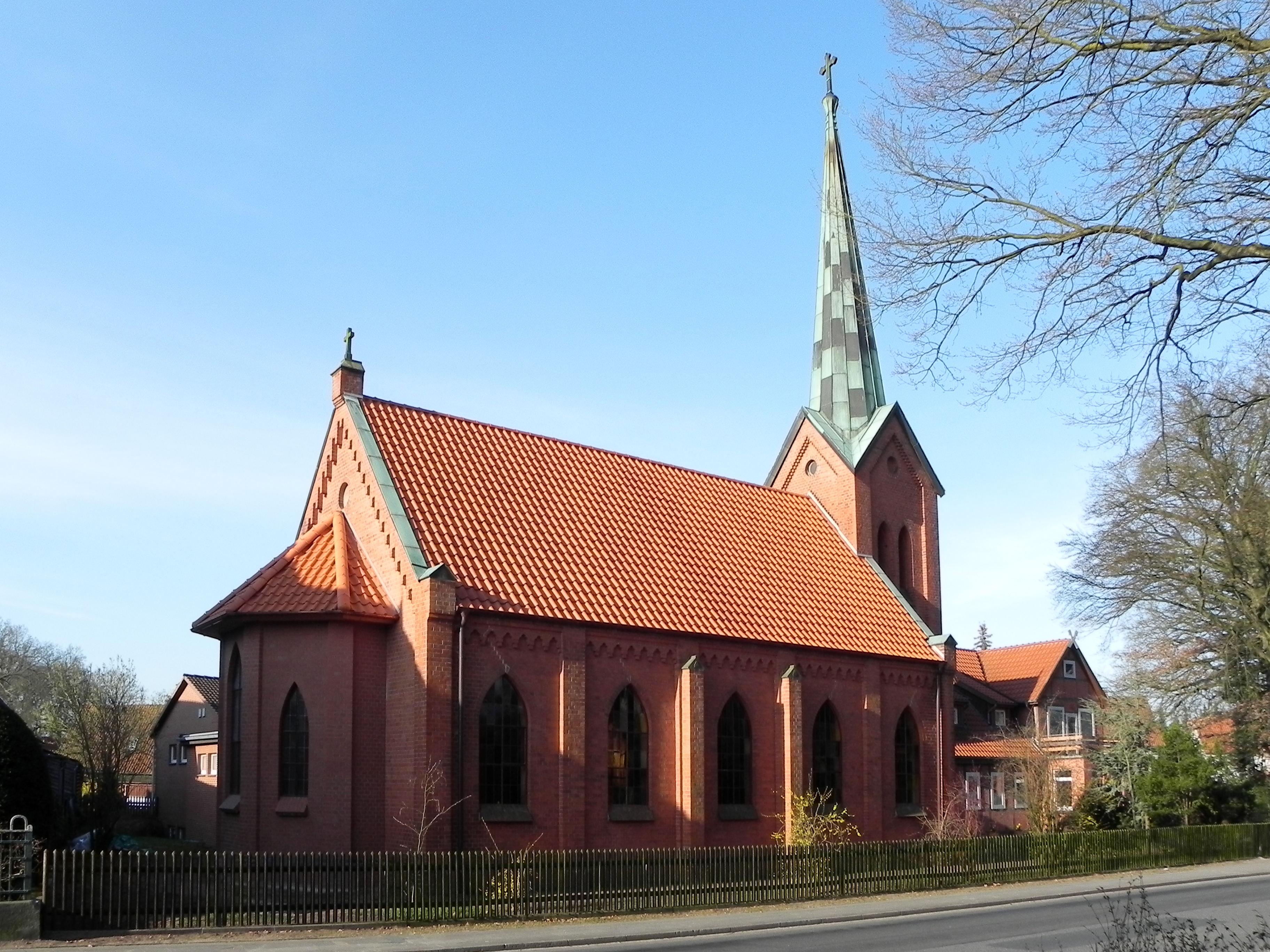 Kleine Kreuzkirche mit neuer in 2011/12 angebauter Apsis